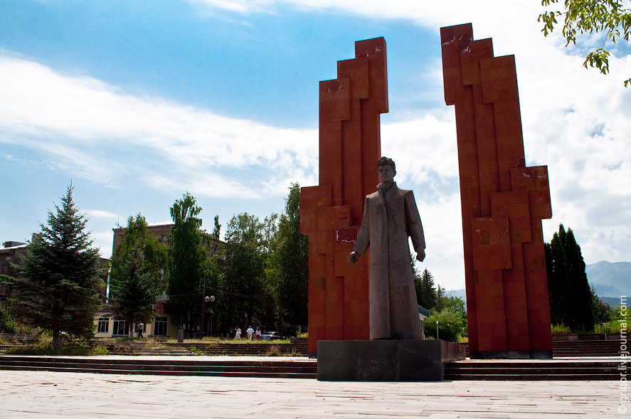 Памятник Степану Шаумяну_1